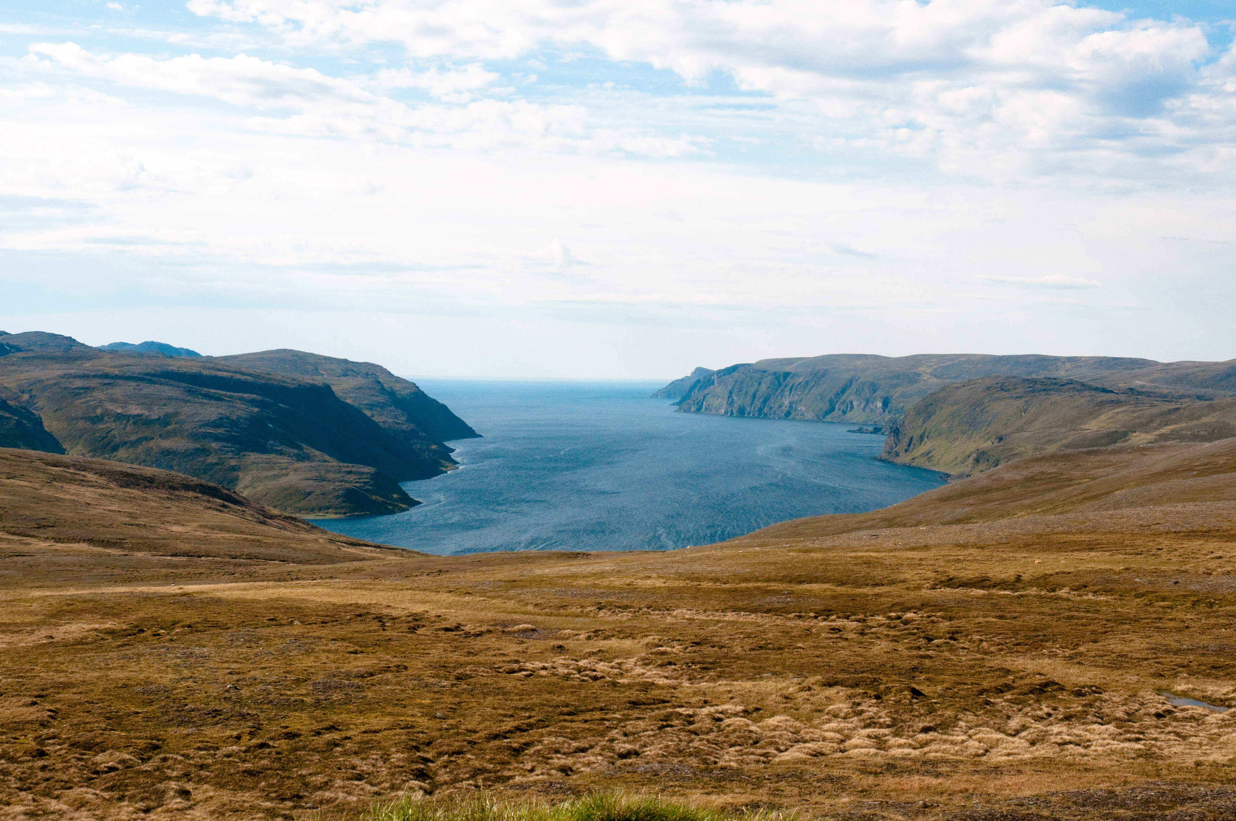 Tufjord on Magerøya in Nordkapp municipality in Finnmark. Just north of this fjord is Nordkap.